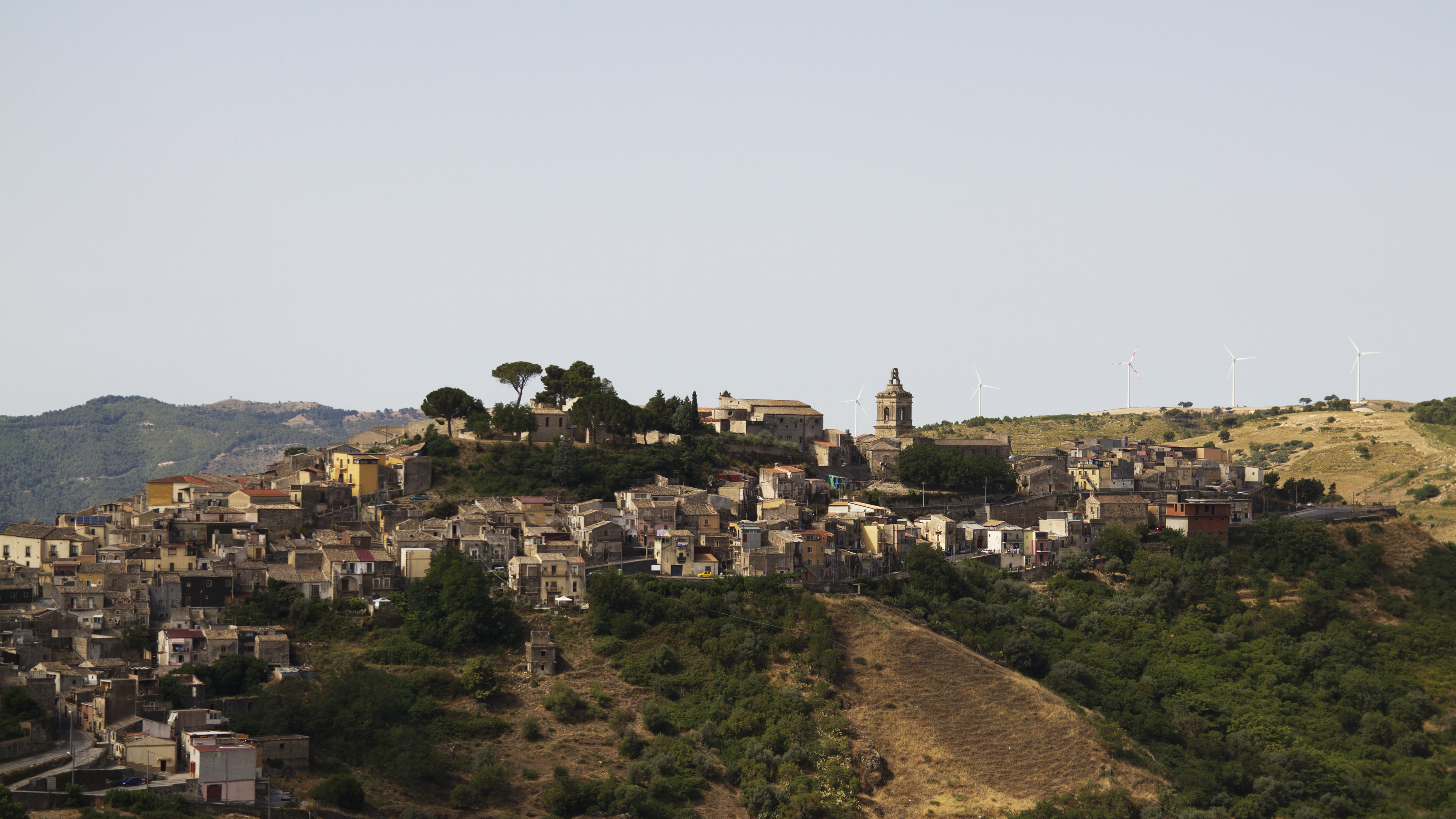 Vizzini, Catania, Sicily, Italy